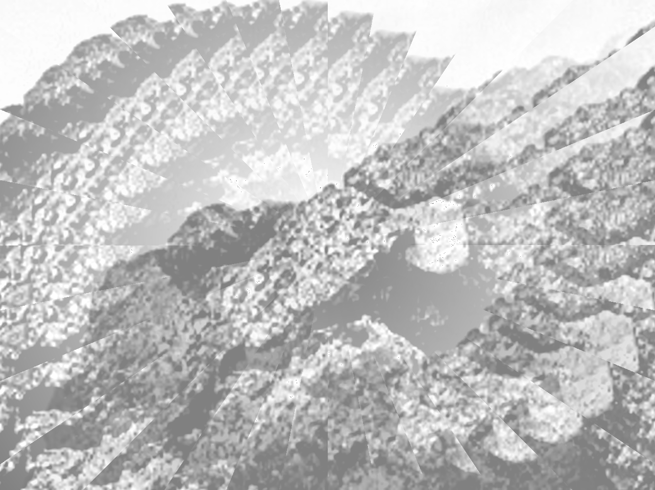 Ein mehr als 170 Jahre alter Koksbrocken bei der Untersuchung mit Röntgenstrahlen